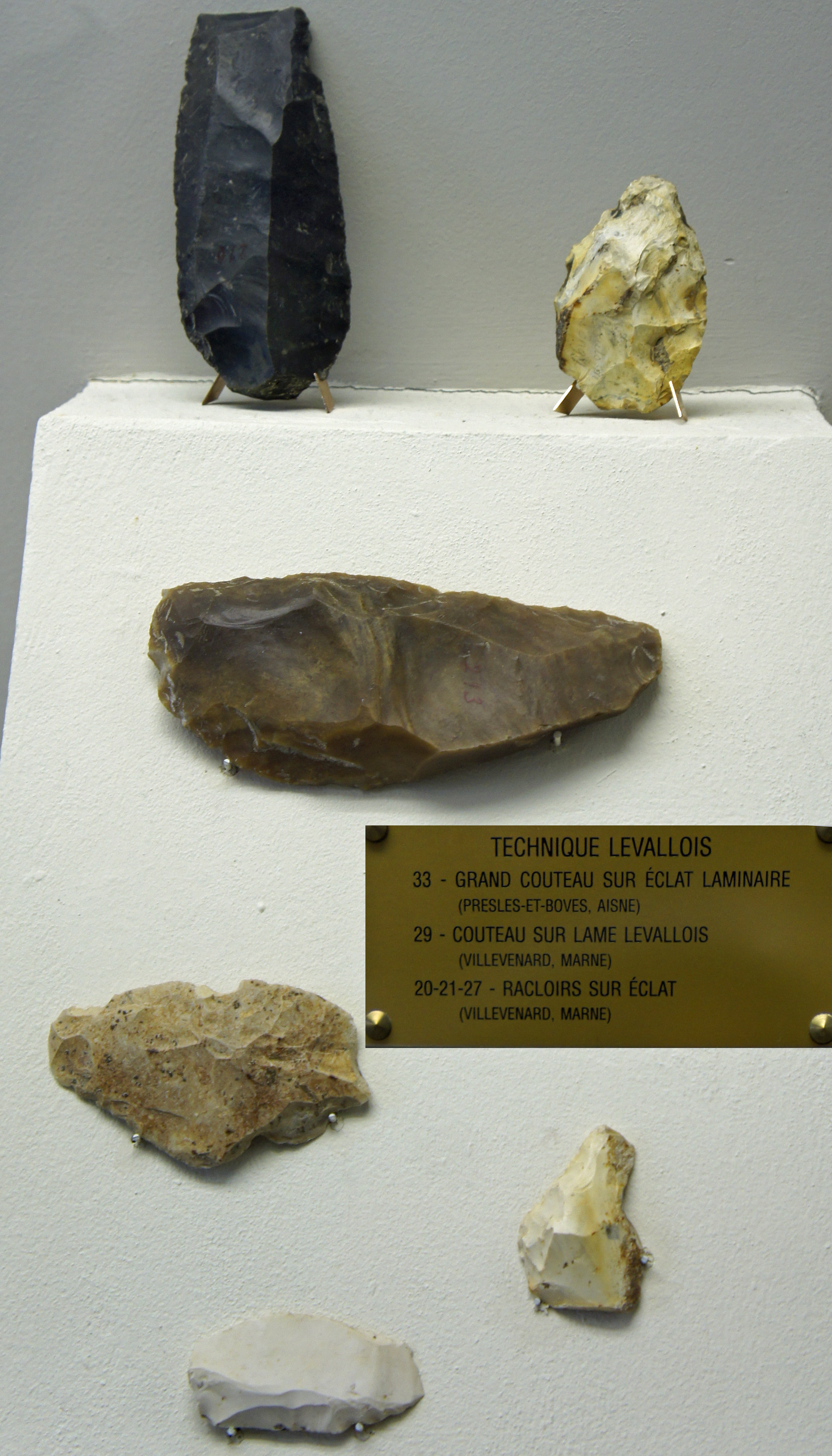 Objets du musée st-Remi de Reims.